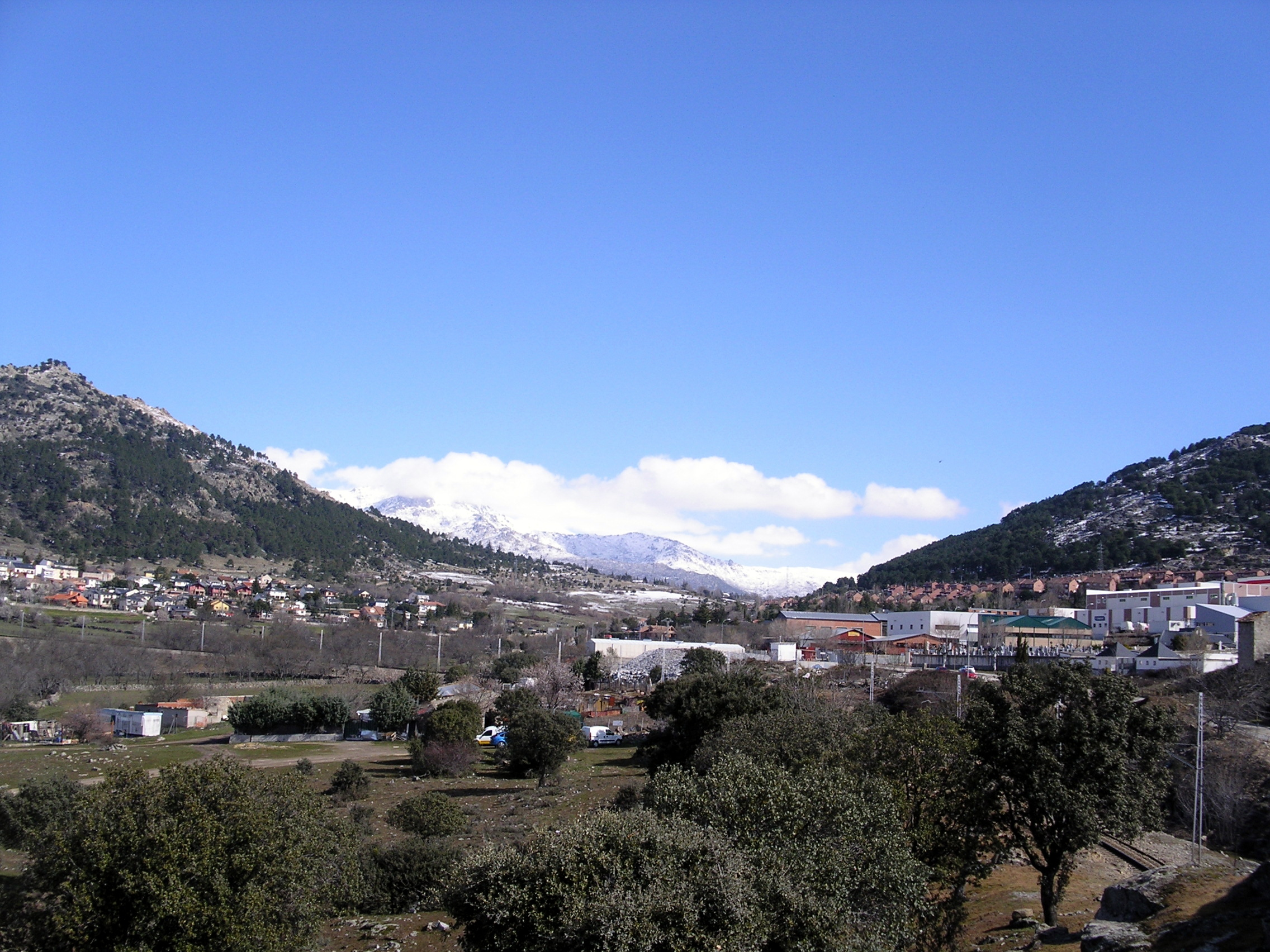 2011-03-06 Collado Mediano